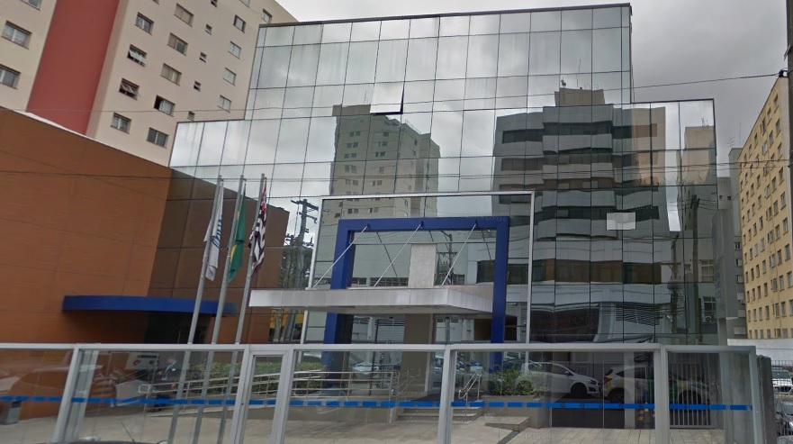 Sede ABNT